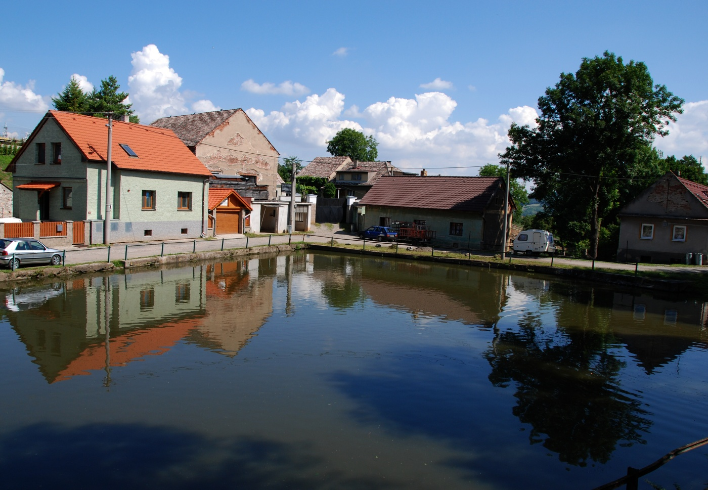 Rybník na návsi Beroun - Jarov